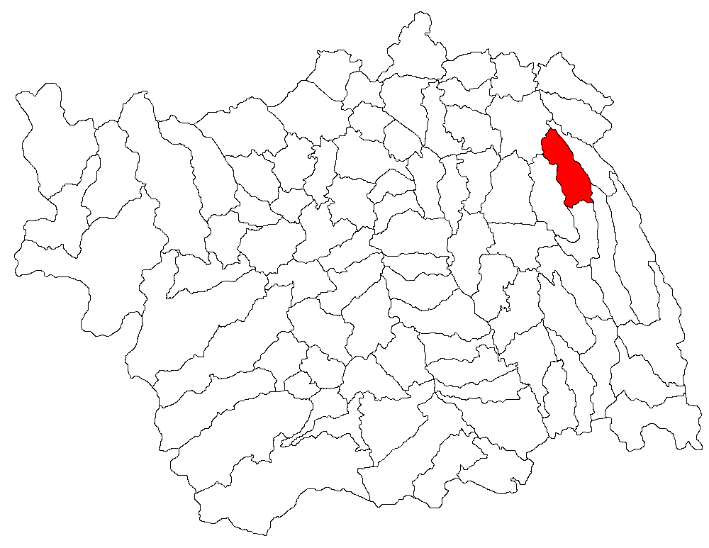 Categorie:Hărţi ale judeţului Bacău